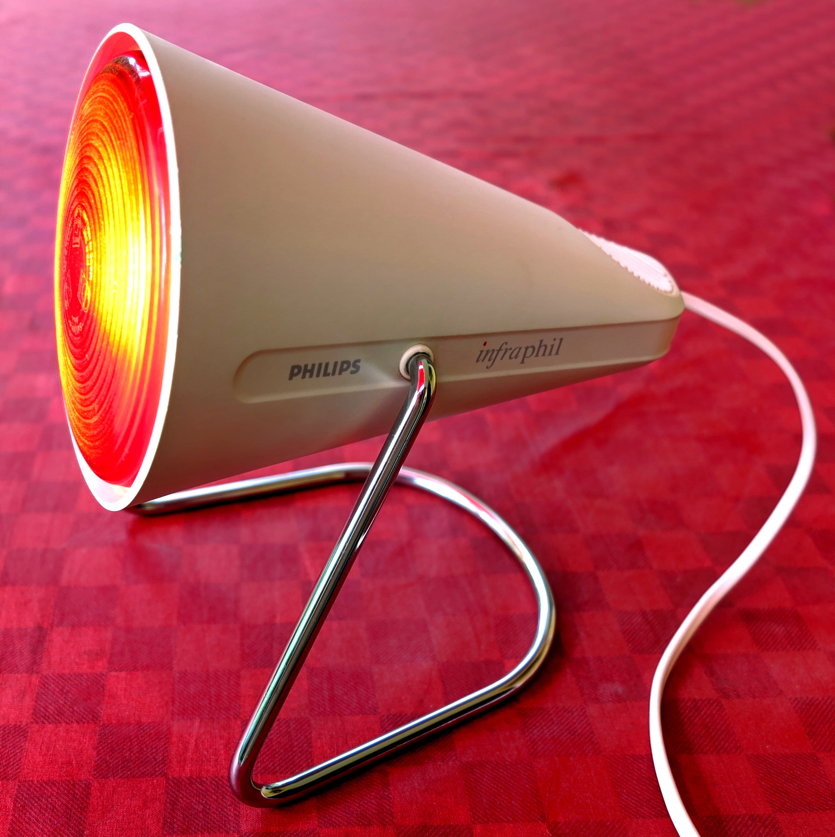 Infrarotlichtlampe zur Schmerzbehandlung, InfraPhil von Philips, 150W, 230V, ca. 1975